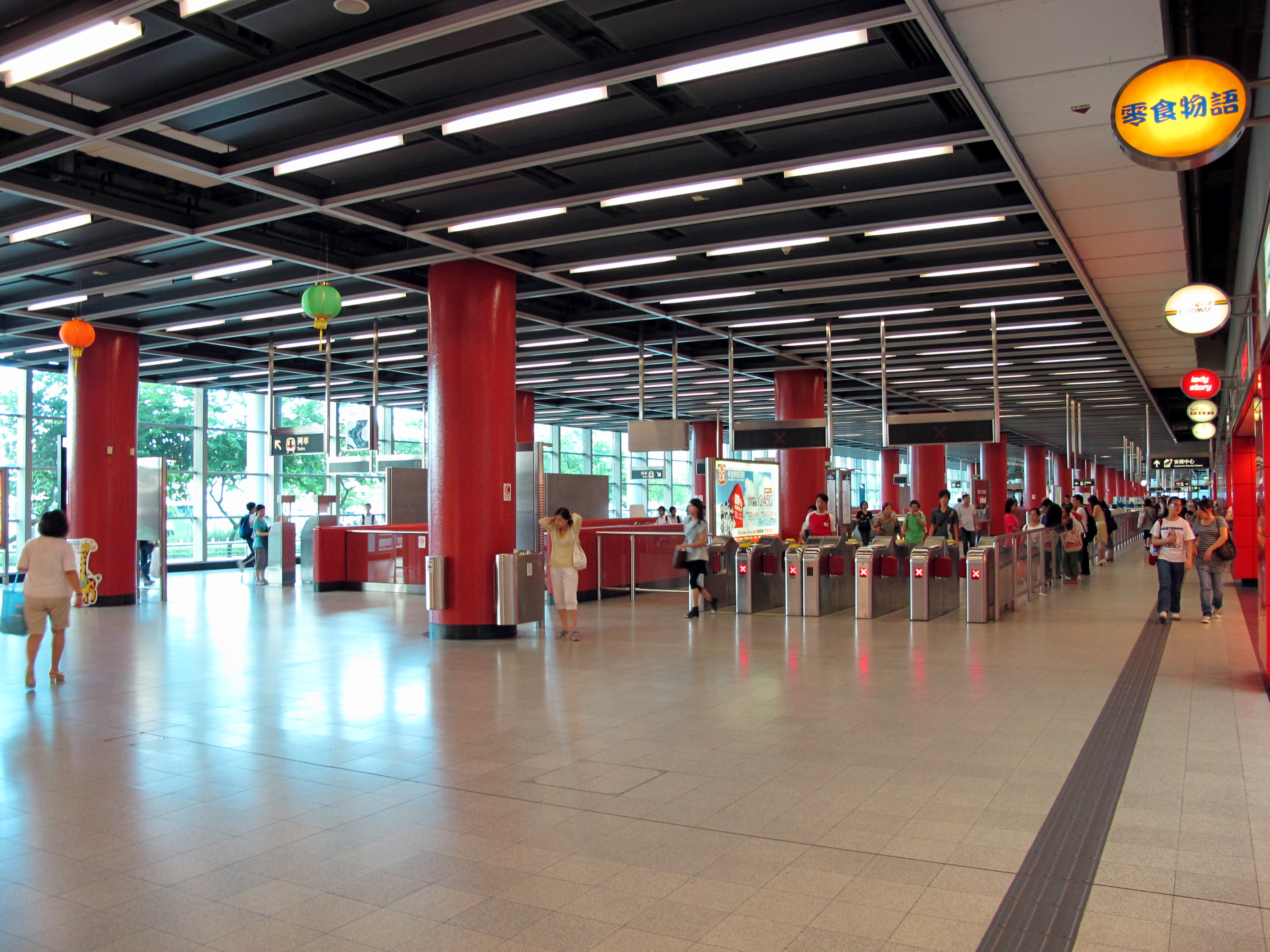 將軍澳站大堂